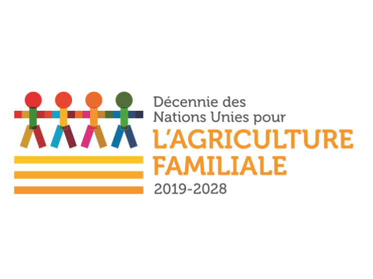 DNUAF Logo